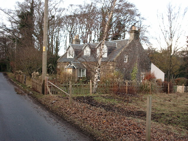 Bottomcraig